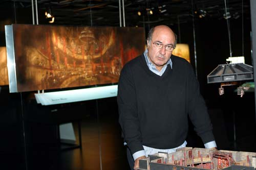 Ferretti nel suo workshop